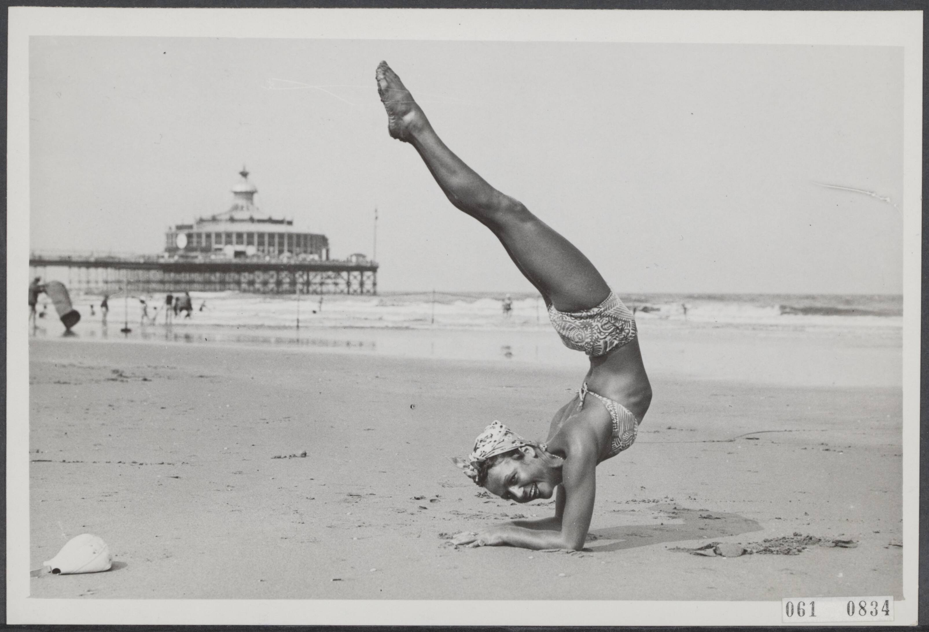 Ilse Meudtner, eerste solodanseres van de Staatsoper te Berlijn, oefent aan het strand te Scheveningen